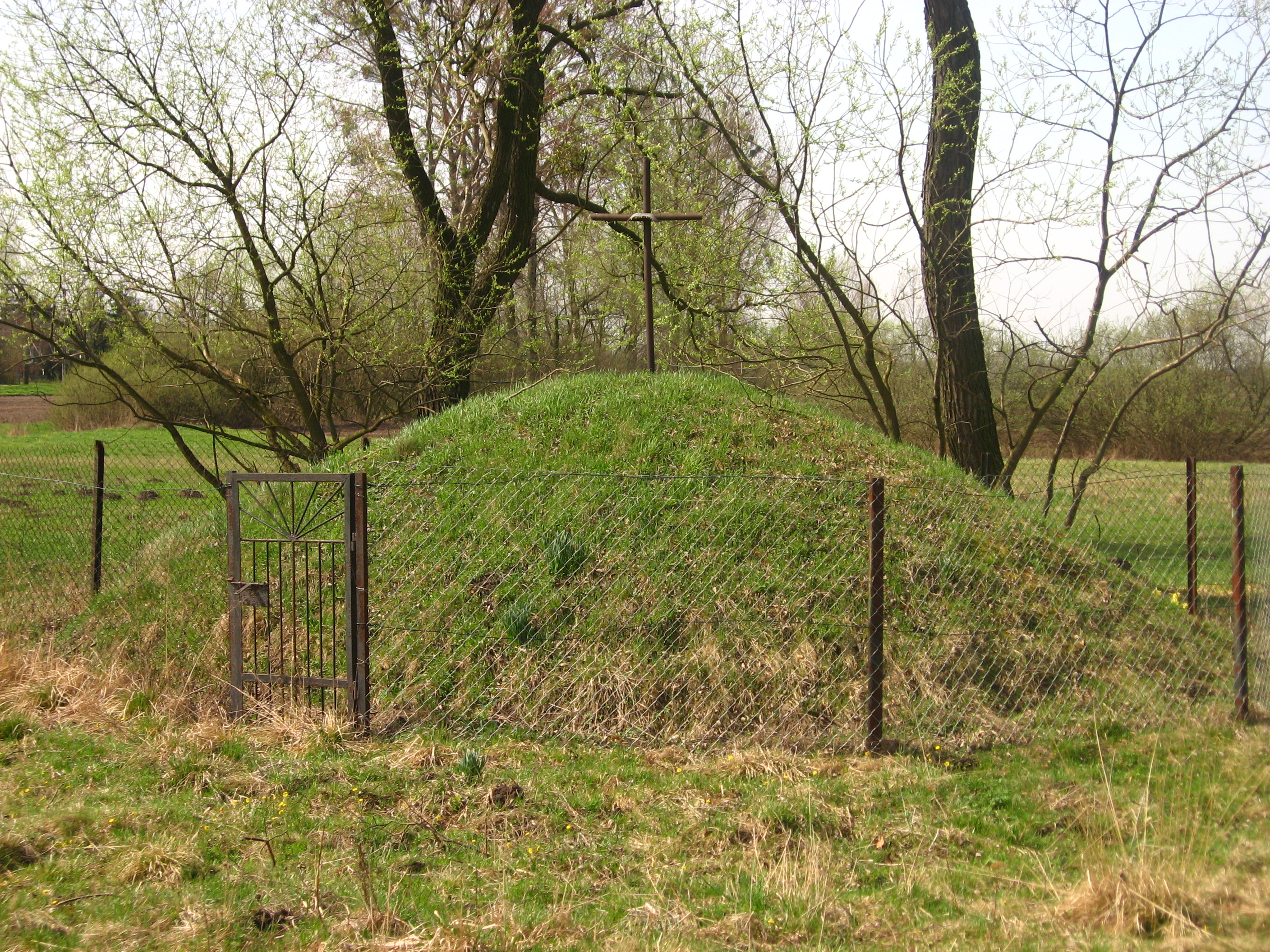 Obrowiec - mogiła z okresu I WŚ